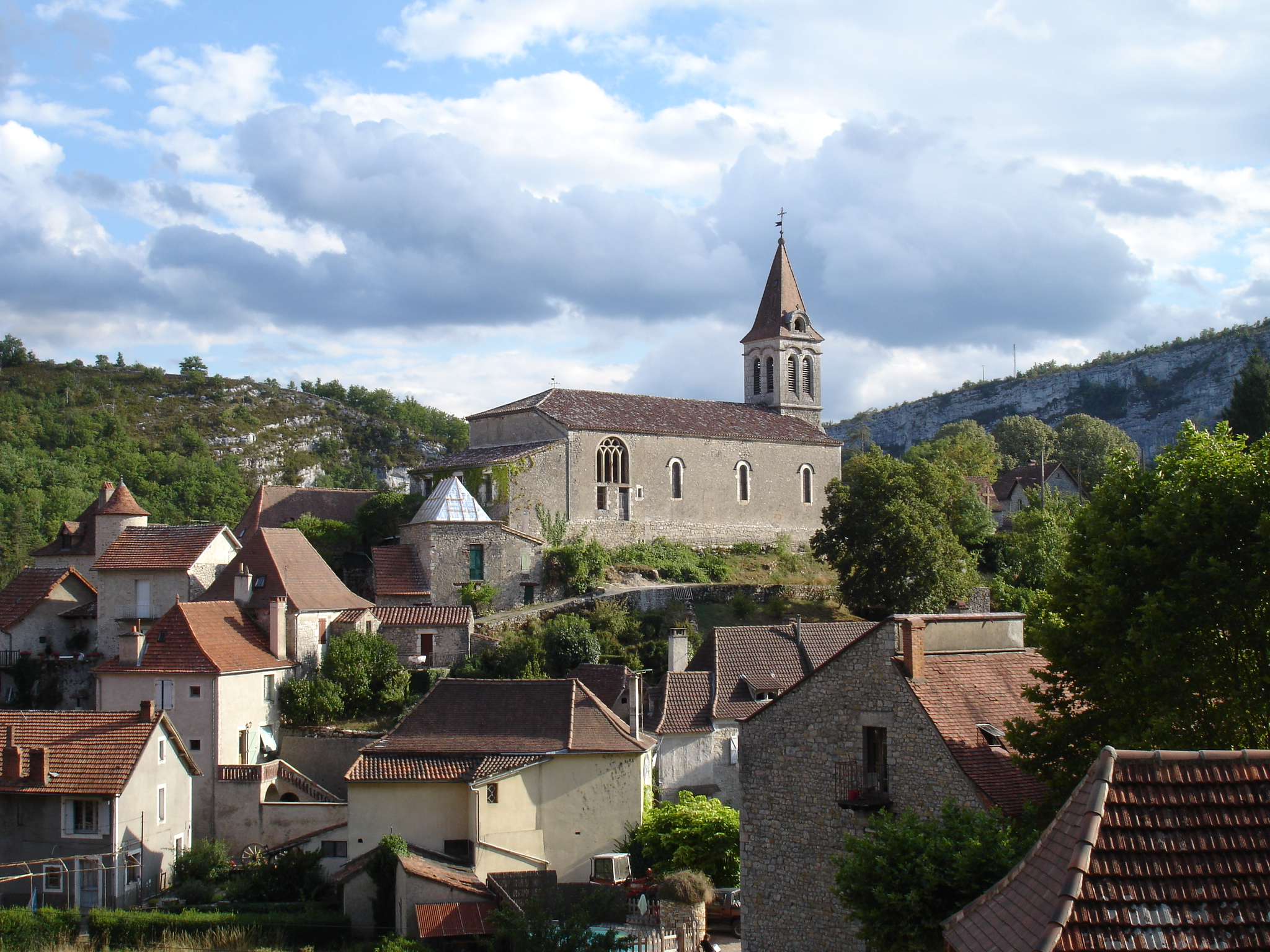 Cabrerets